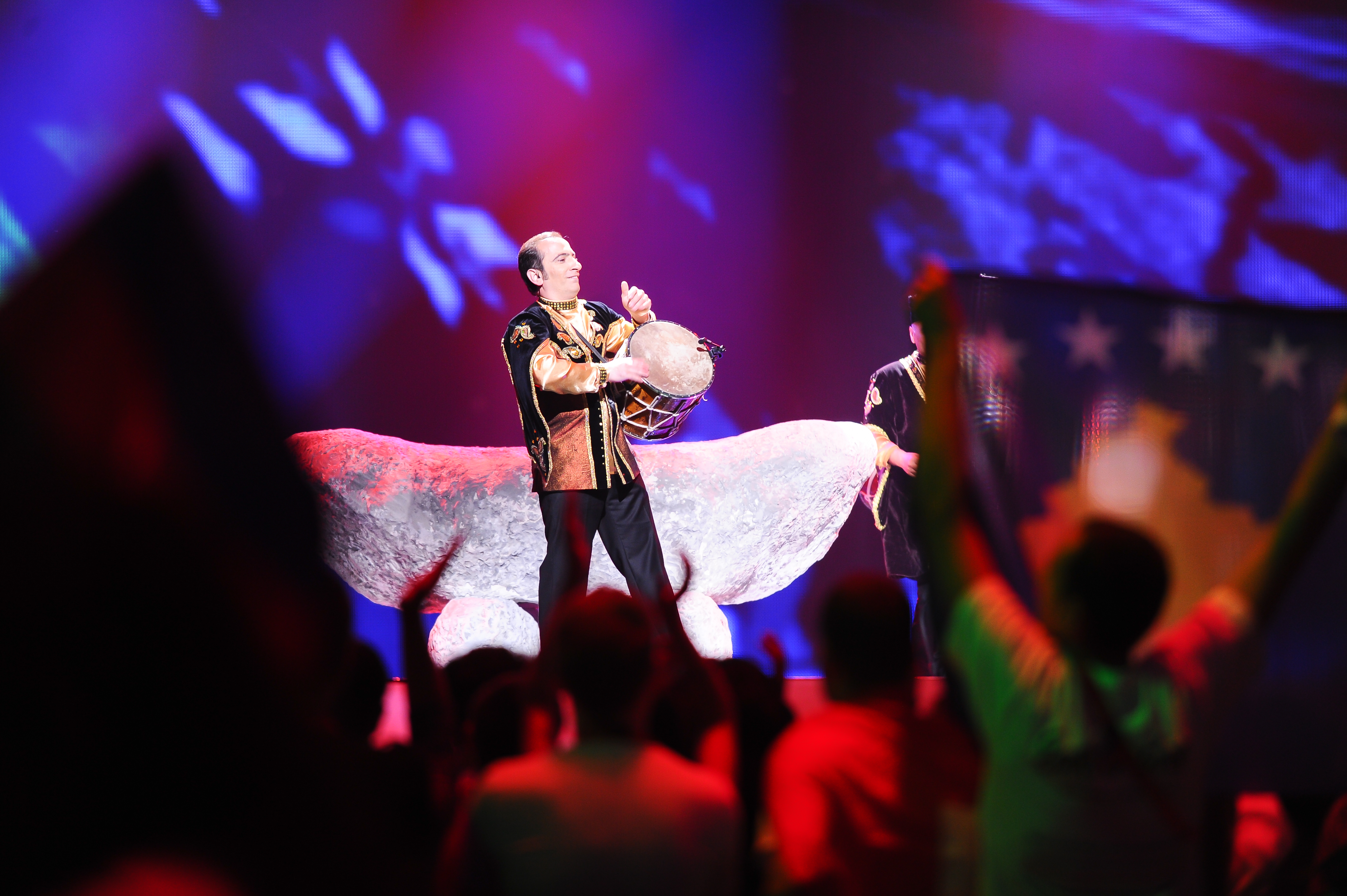 Натиг Ширинов на сцене Baku Crystal Hall